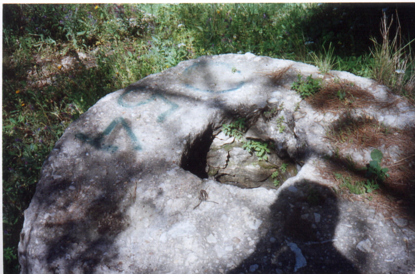 أحد المناظر في قرية قولة الفلسطينة